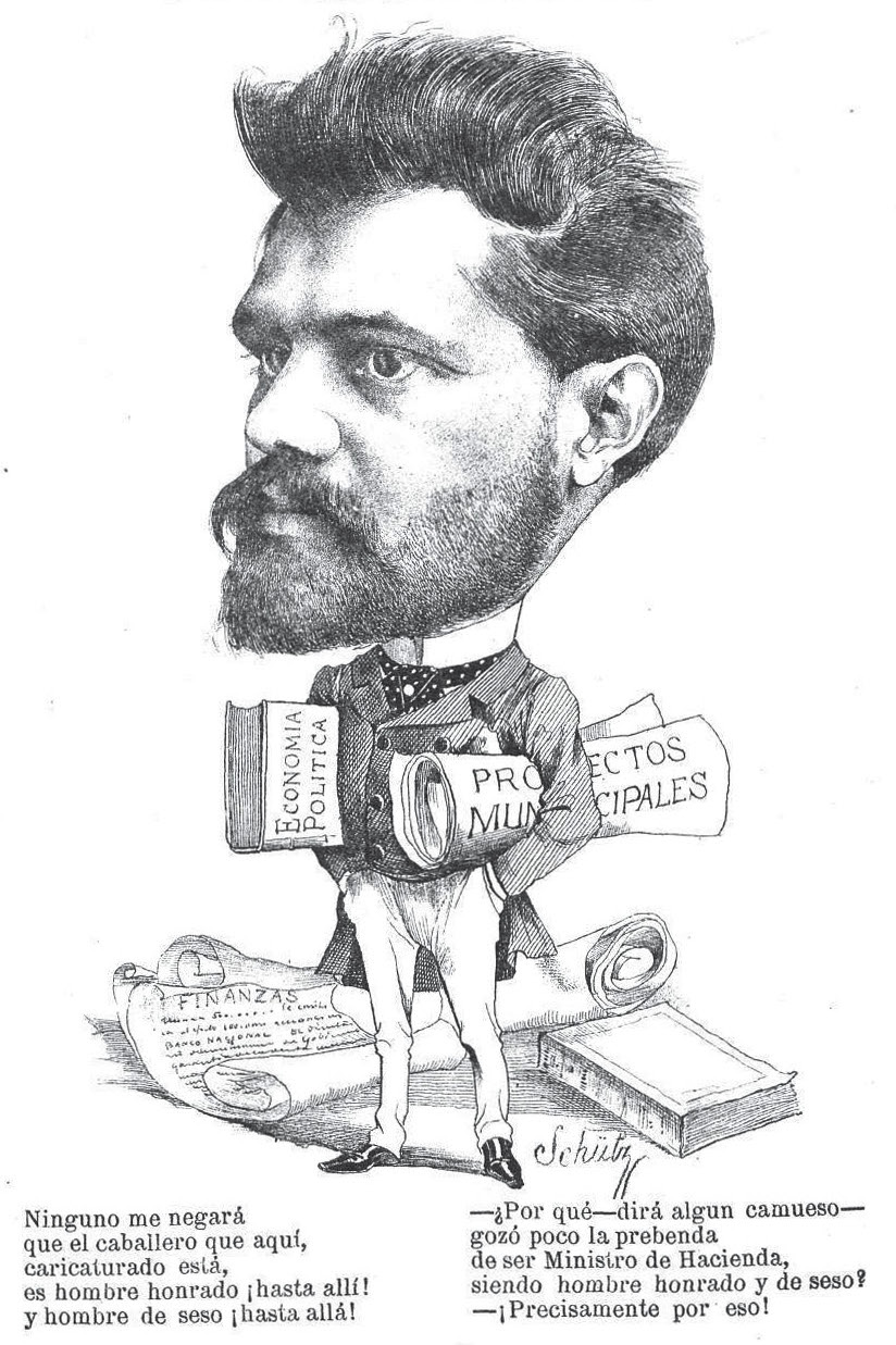 Caricatura de Carlos María de Pena por Charles Schütz